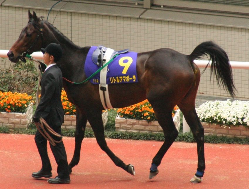 リトルアマポーラ(Little Amapola)